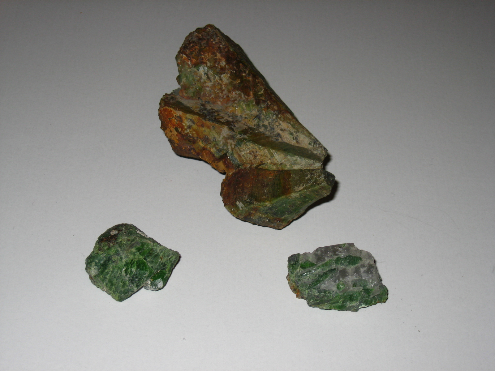 Kriomidiopsidikiteitä Outokummusta.